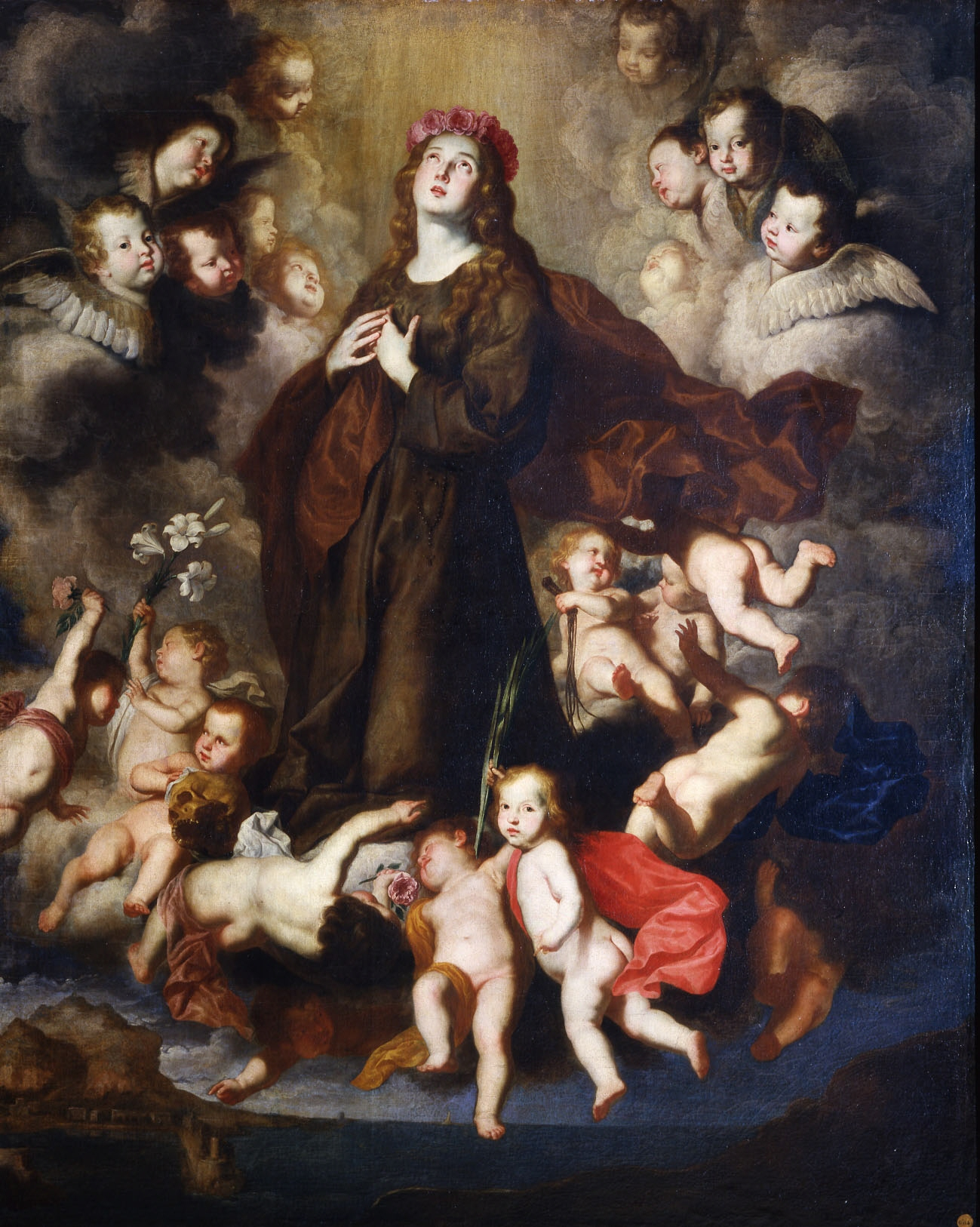 La obra representa a Santa Rosalía de Palermo en la gloria.